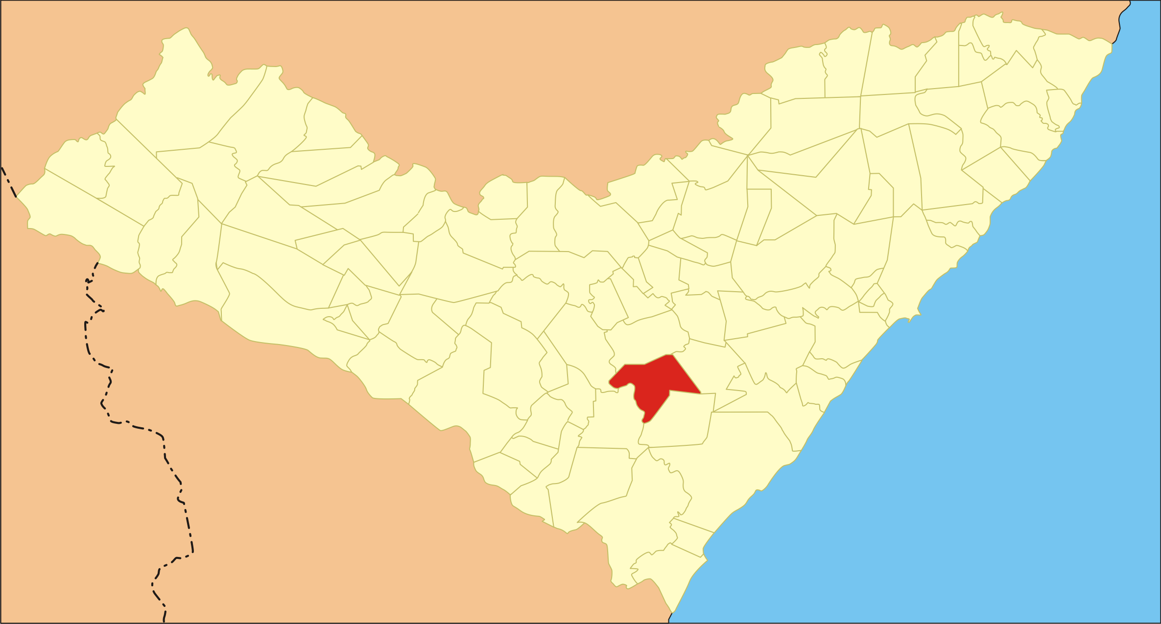 Localização da cidade no estado de Alagoas.